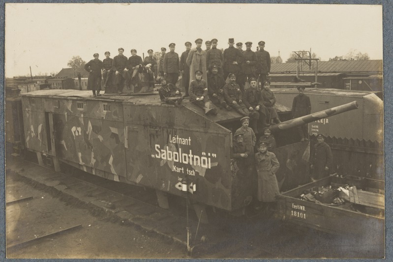 Laiarööpmelise soomusrongi nr 6 suurtükiplatvorm "Leitnant Sabolotnõi Kartetsch" Eesti Vabadussõjas Valga jaamas.